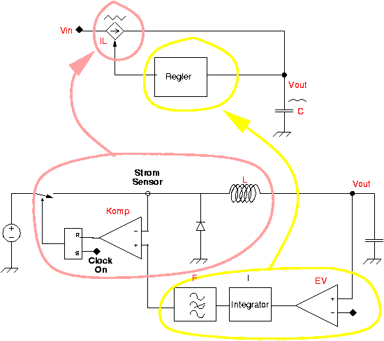 (Prinzip einer Stromregelung eines DCDC-Wandlers)